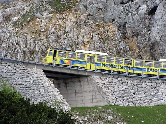 Wendelsteinbahn